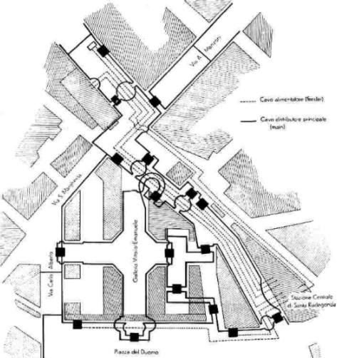 Verteilnetz Kraftwerk Santa Radegonda